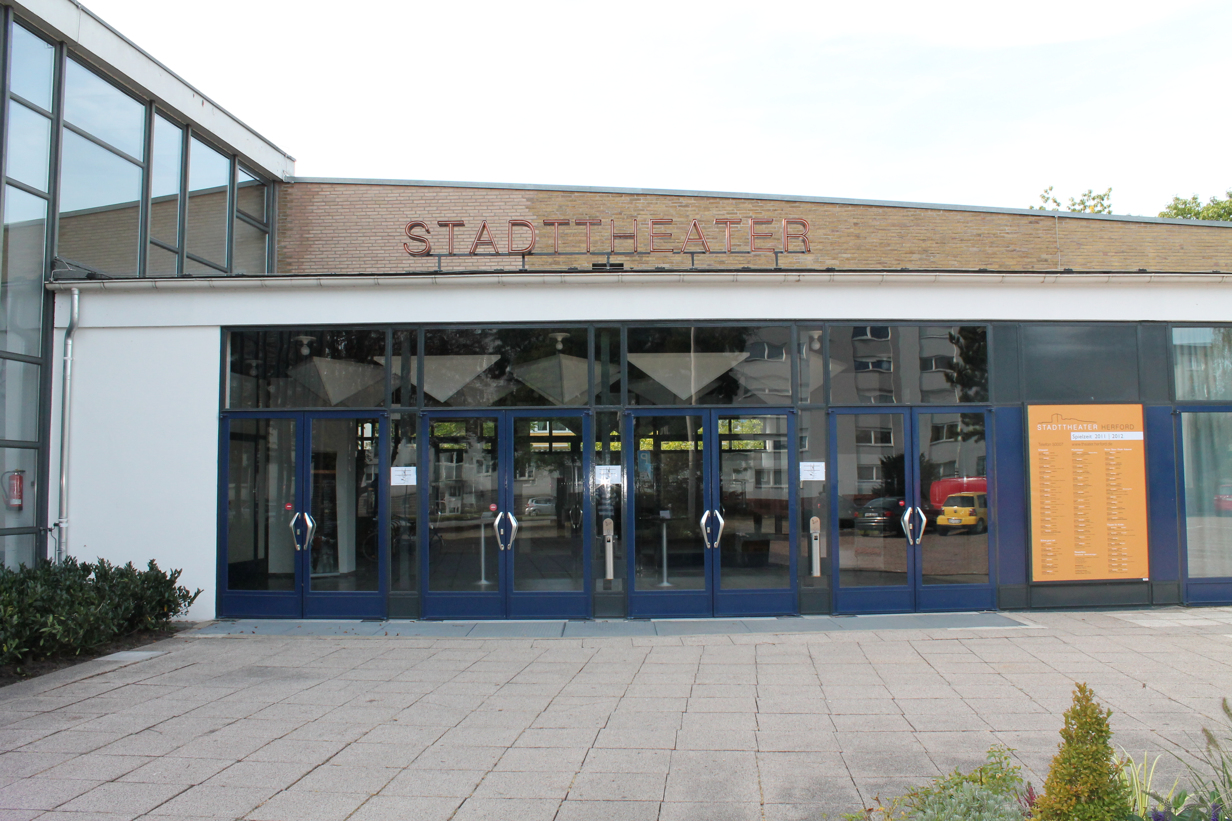 Herford, Baudenkmal 469, Portal